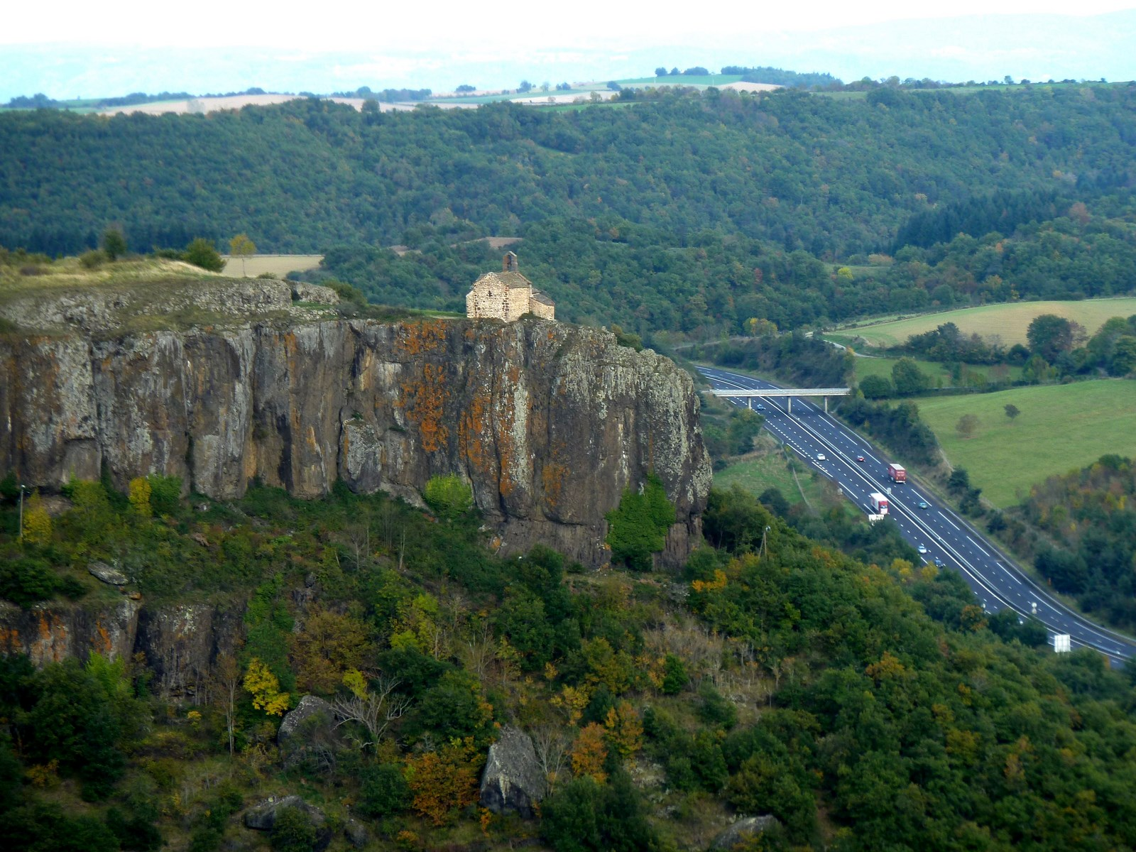 Autoroute A75 et Chapelle Sainte-Madeleine de Chalet - Massiac - Cantal - France